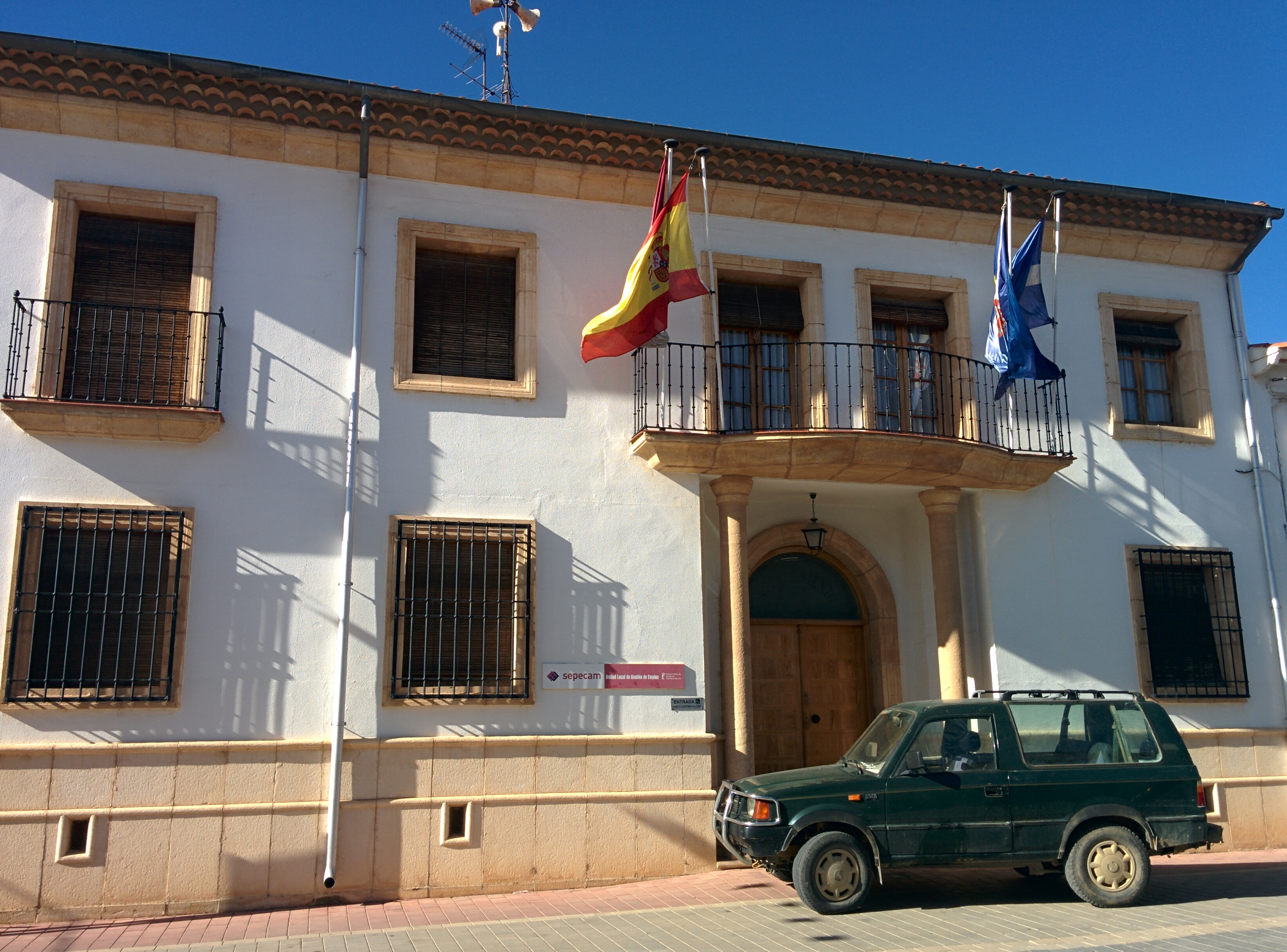 Casa consistorial de Santa María de los Llanos (Cuenca, España).